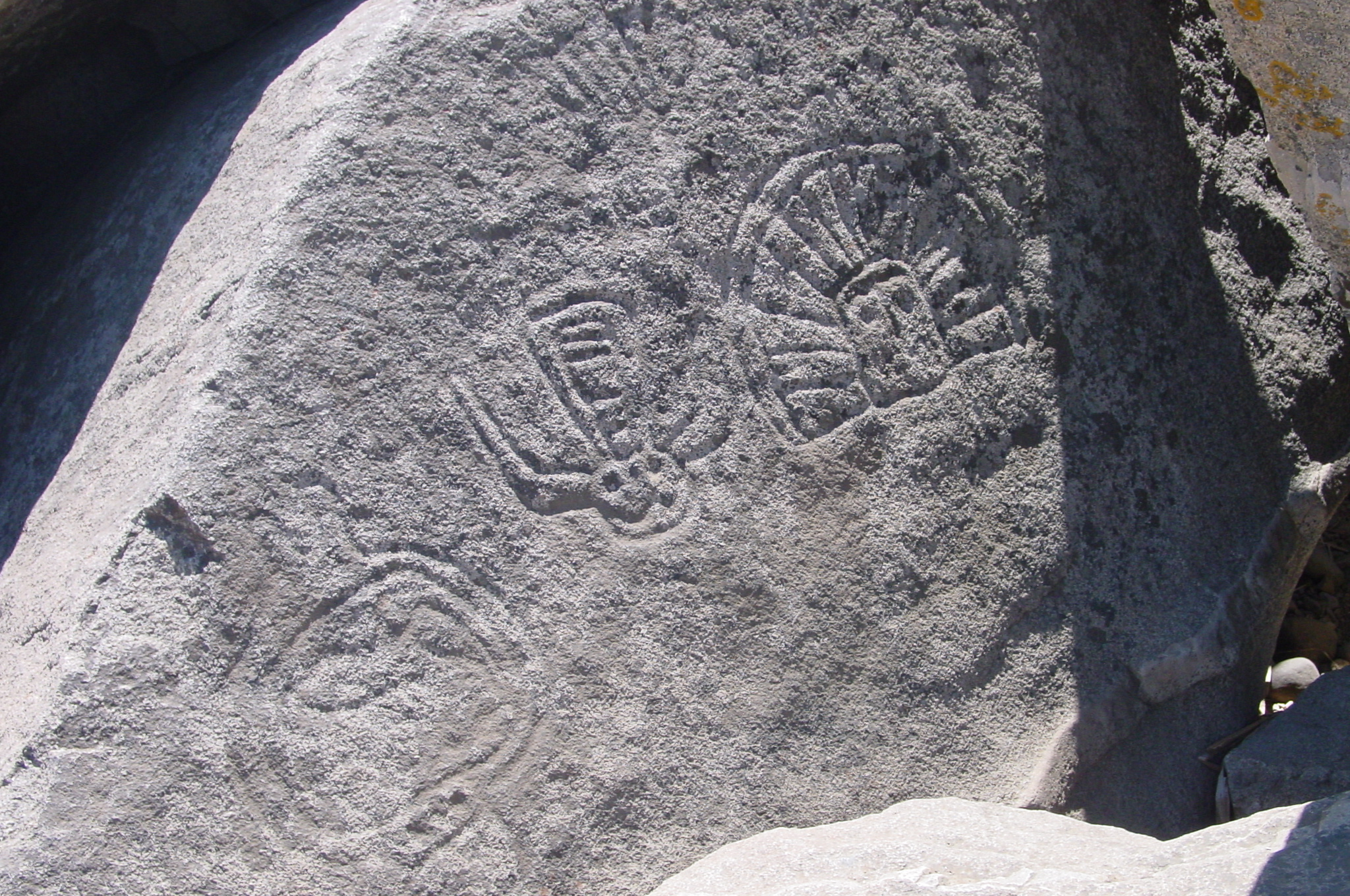 Pétroglyphes de la civilisation "el Molle" 700avant j-c, Valle del encanto, comuna de Ovalle, provincia de Limari, Región IV, Chile. .